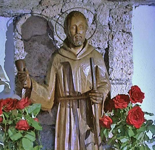 Talla que se encuentra en la conocida Cueva del hermano Pedro